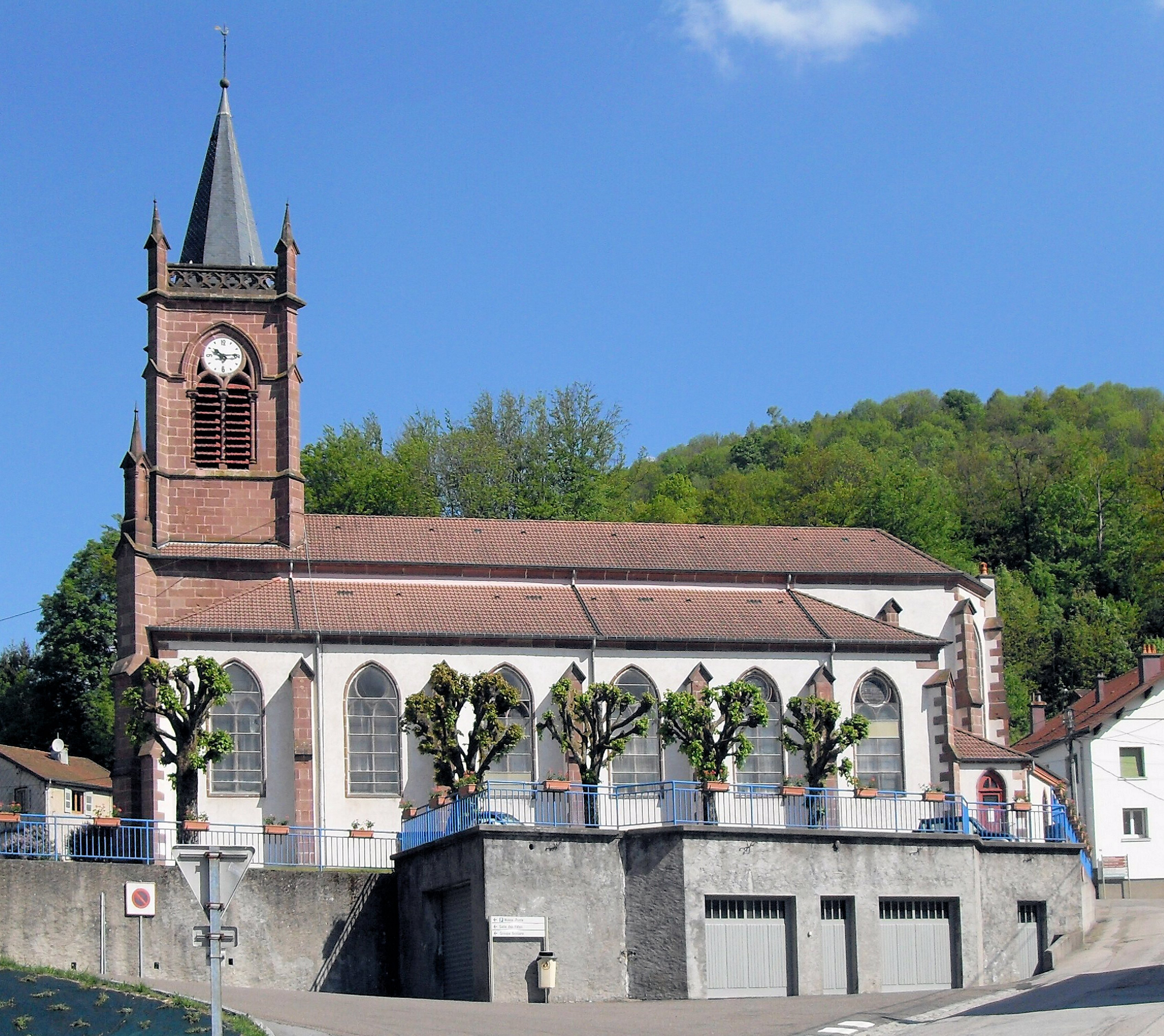 L'église Saint-Brice á Fresse-sur-Moselle